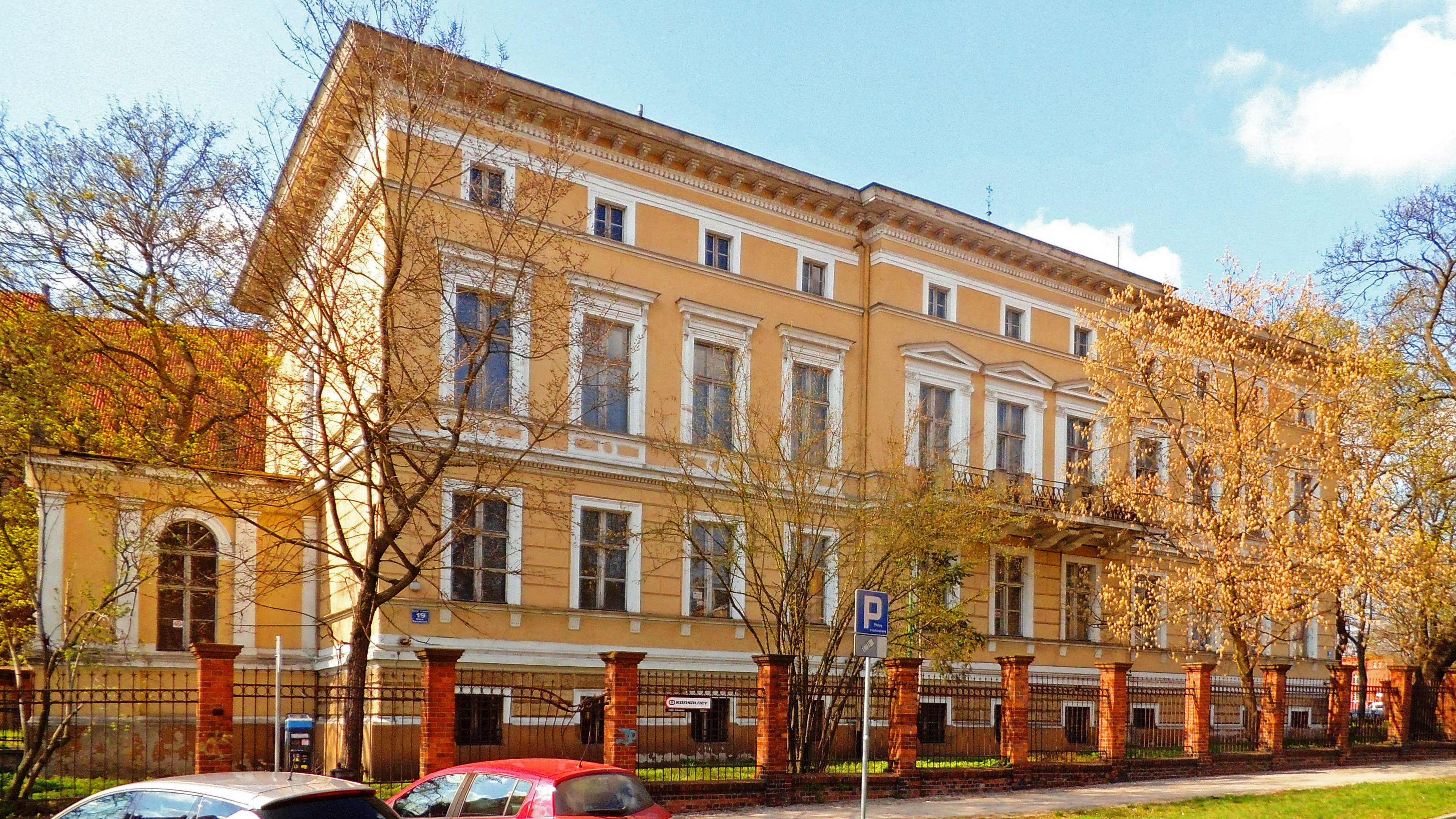 Dawna siedziba Urzędu Królewskiej Fortyfikacji w Toruniu